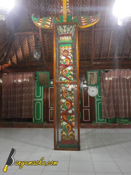 Saka Guru Tiang Tunggal